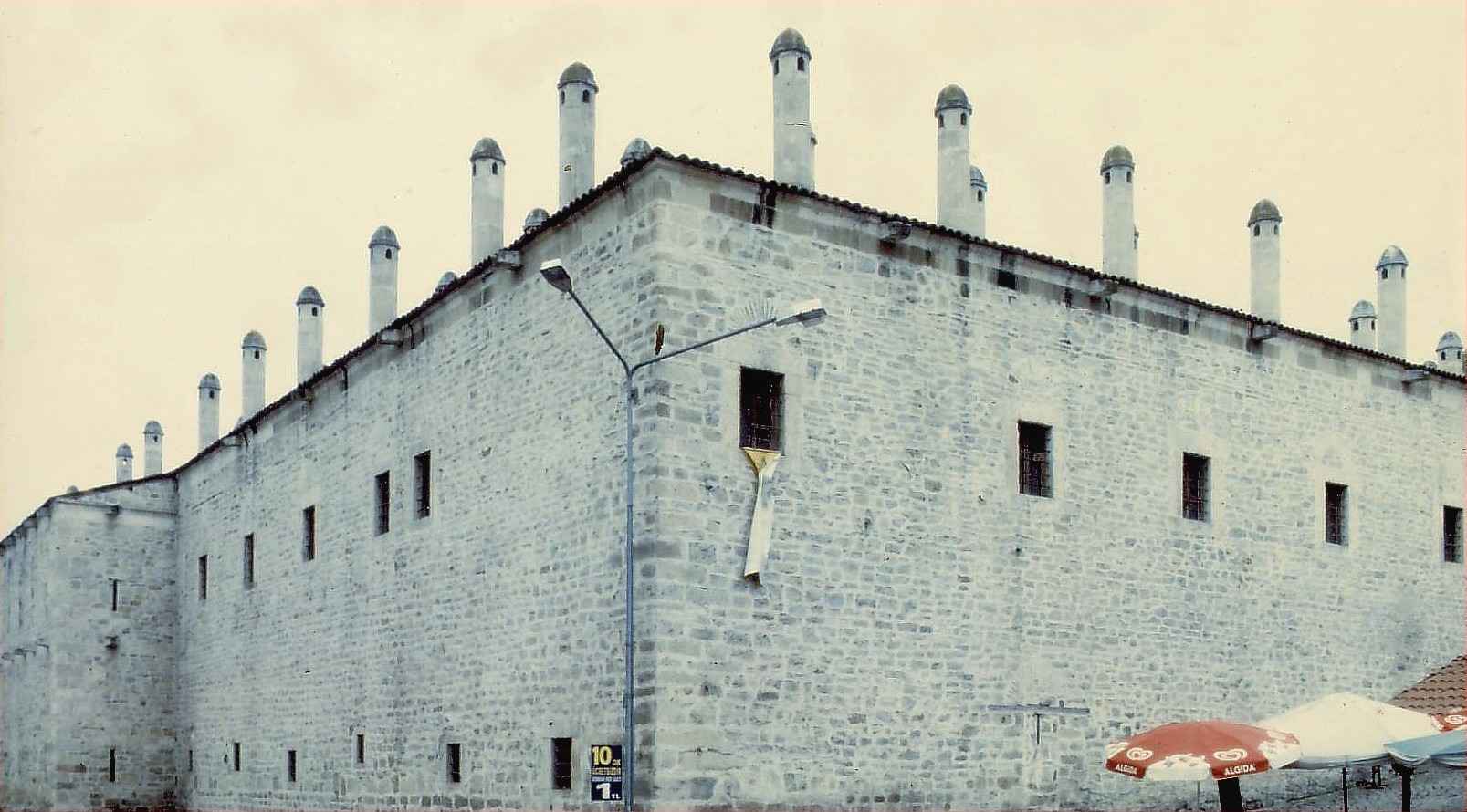 Karawanserei in Safranbolou